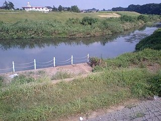 下新河岸跡（埼玉県川越市下新河岸）